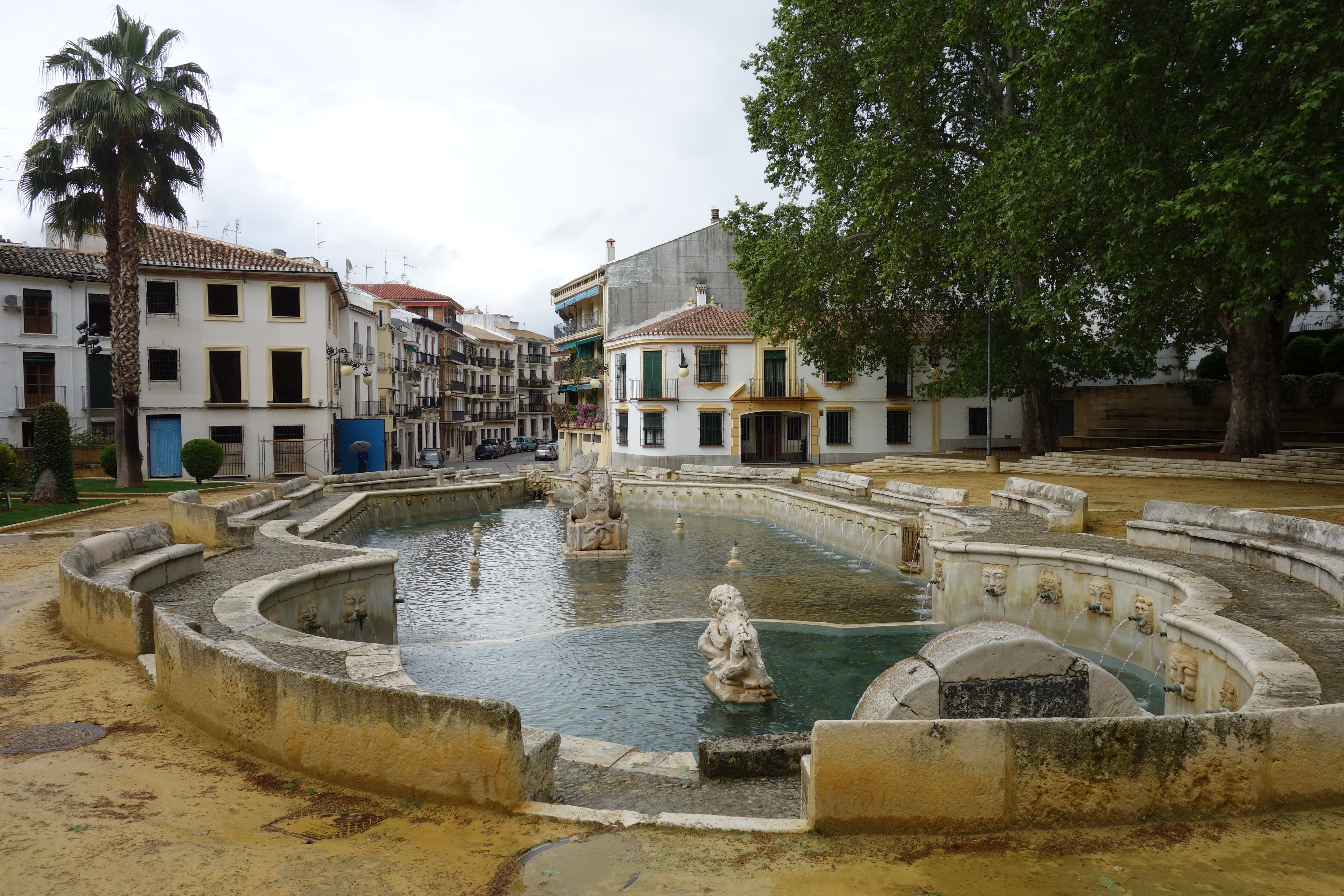 Fuente del Rey, Priego de Córdoba